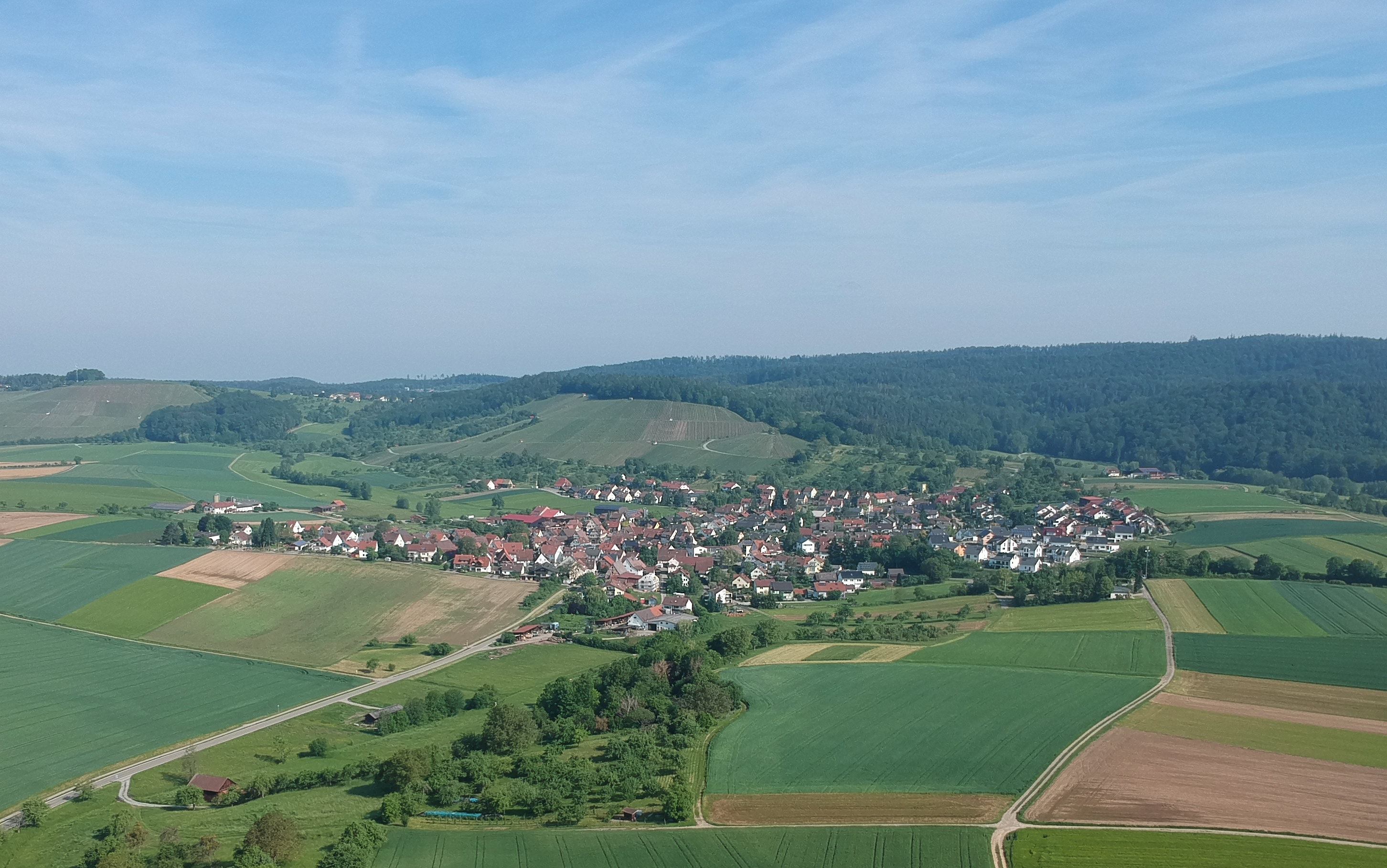 Allmersbach am Weinberg, Gemeinde Aspach (bei Backnang), aus südlicher Richtung gesehen